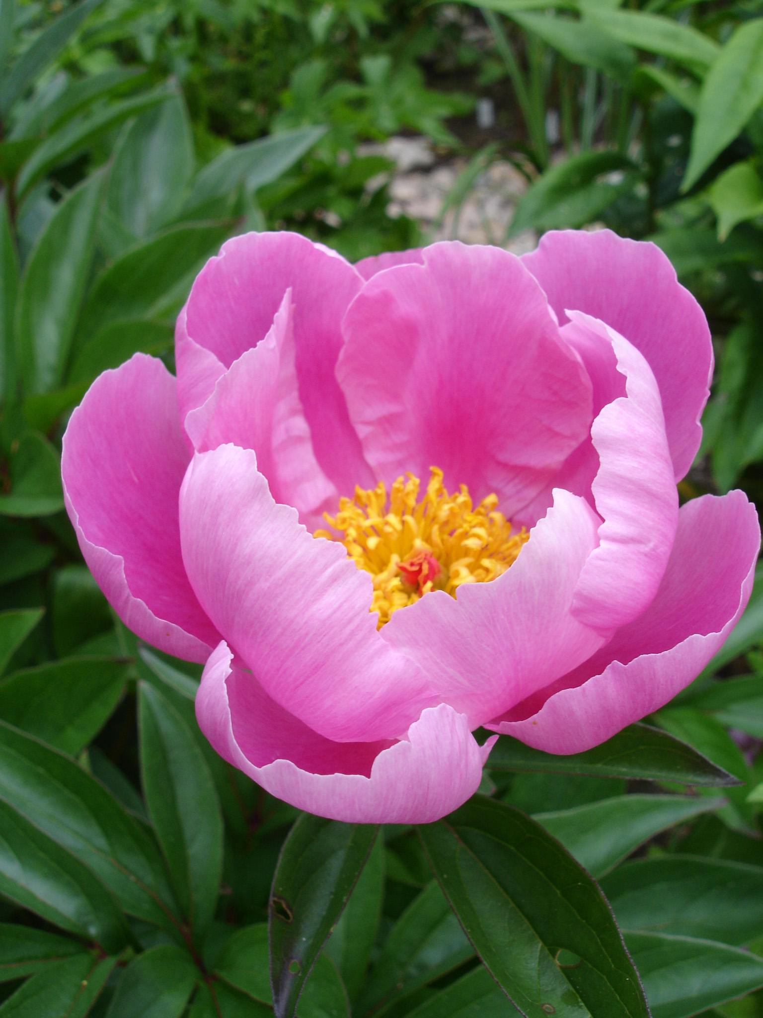 Paeonia lactiflora